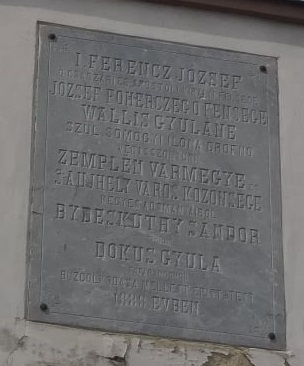 Sátoraljaújhelyi tűztorony emléktábla